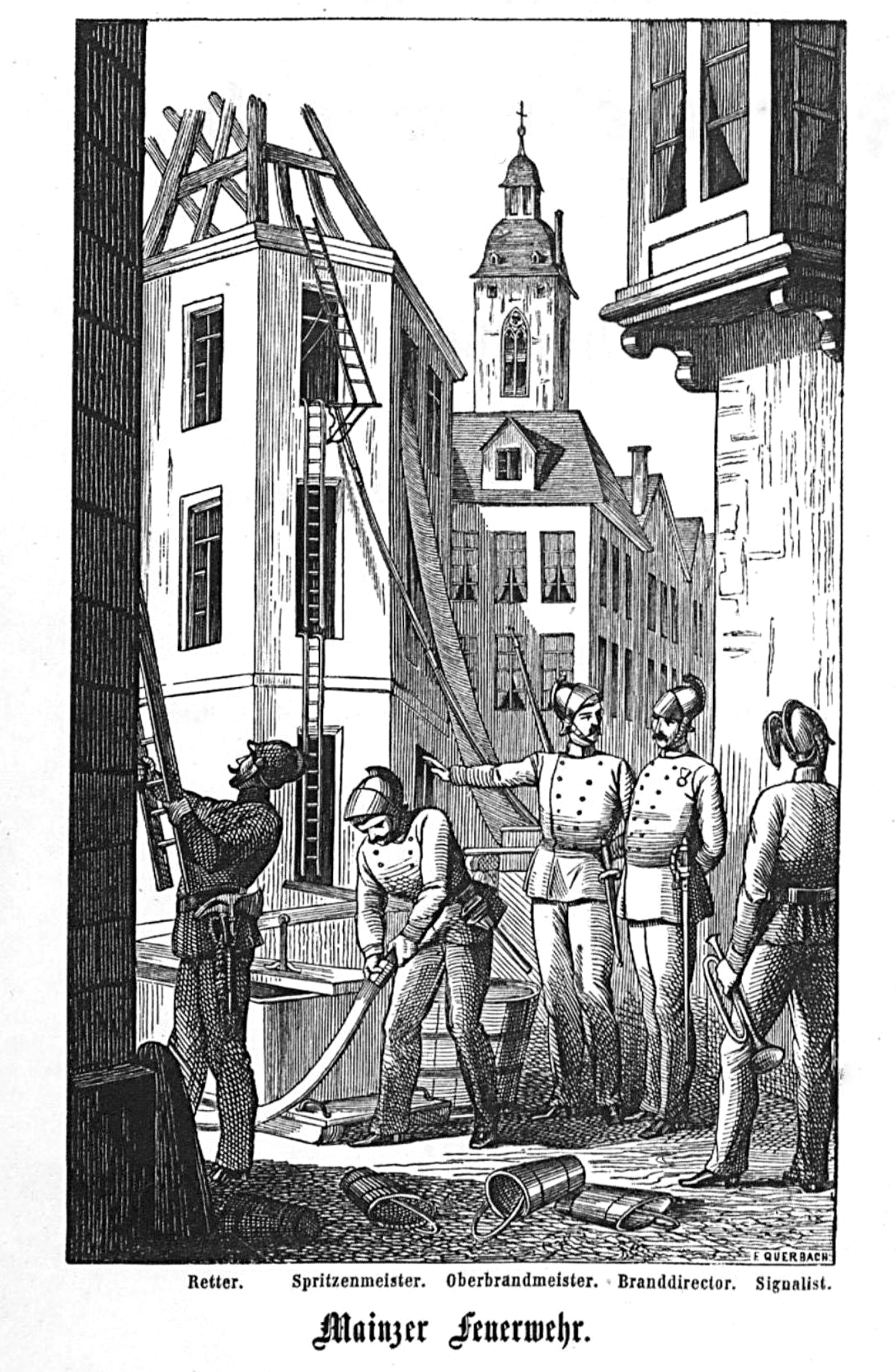 Funktionen bei der Mainzer Feuerwehr